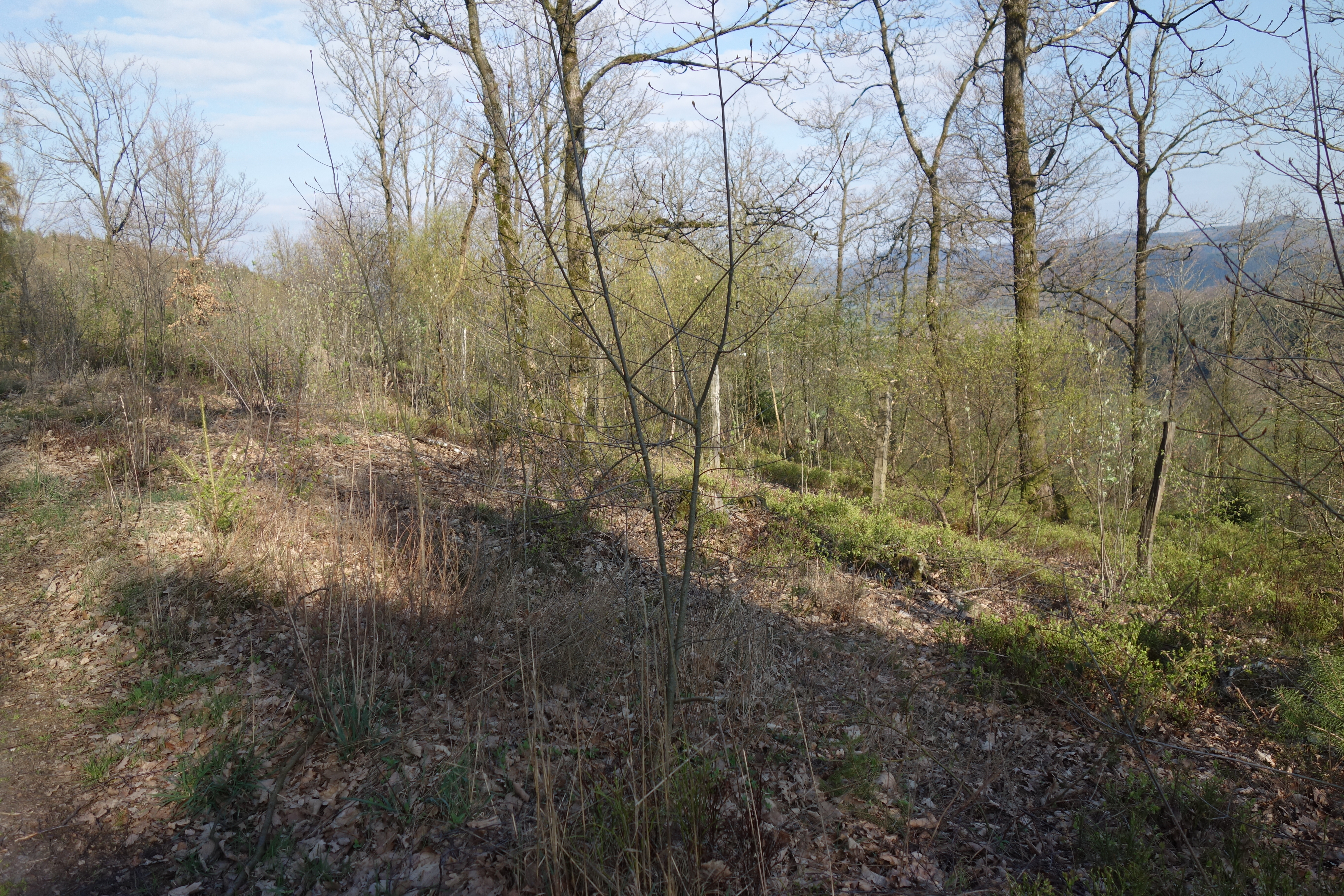 Bild von der westlichen Teilfläche des Naturschutzgebiet Niederwälder bei Visbeck; aufgenommen vom Weg an der nördlichen Grenze.